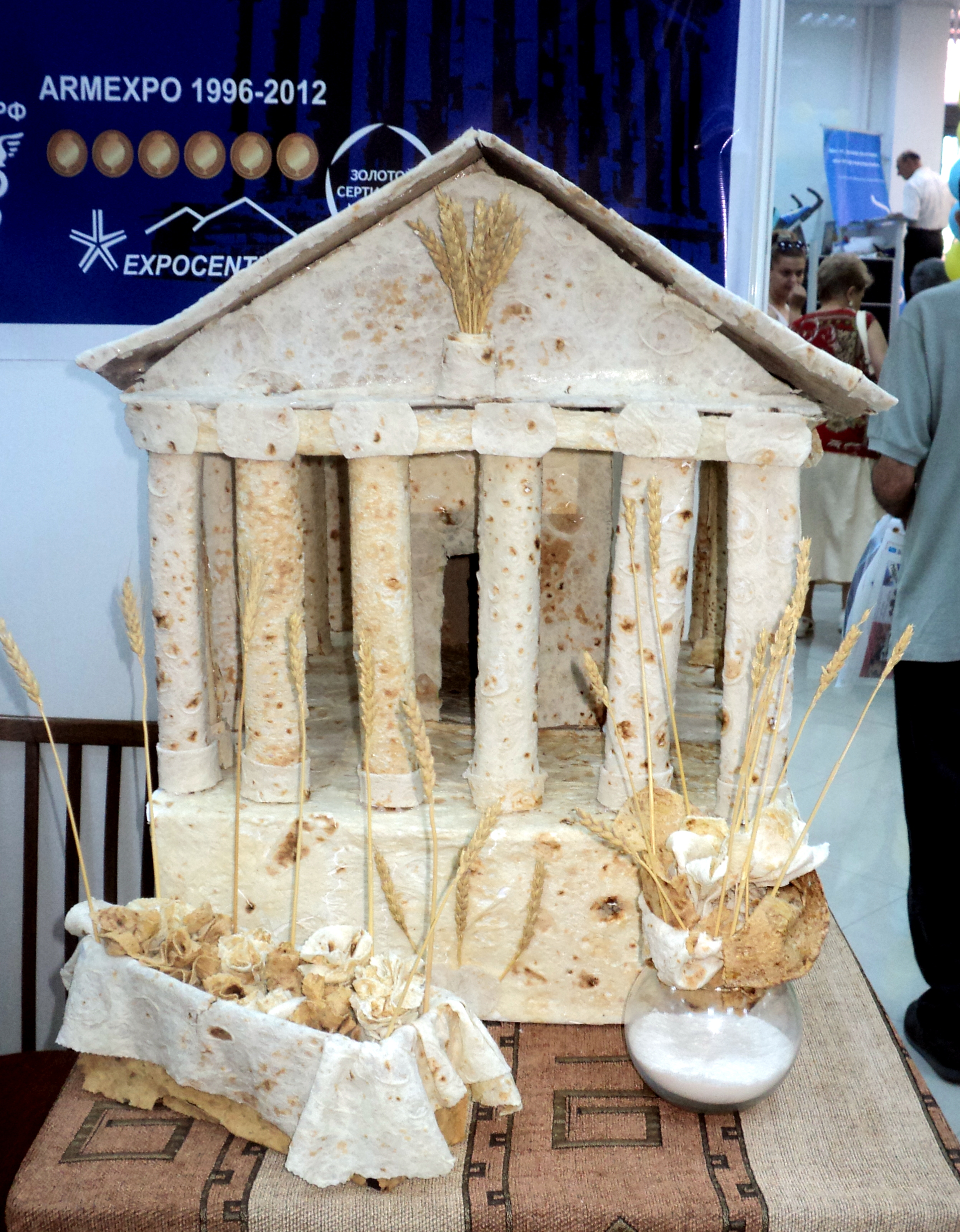 Garni Temple made from lavash, ArmExpo 2013, Yerevan